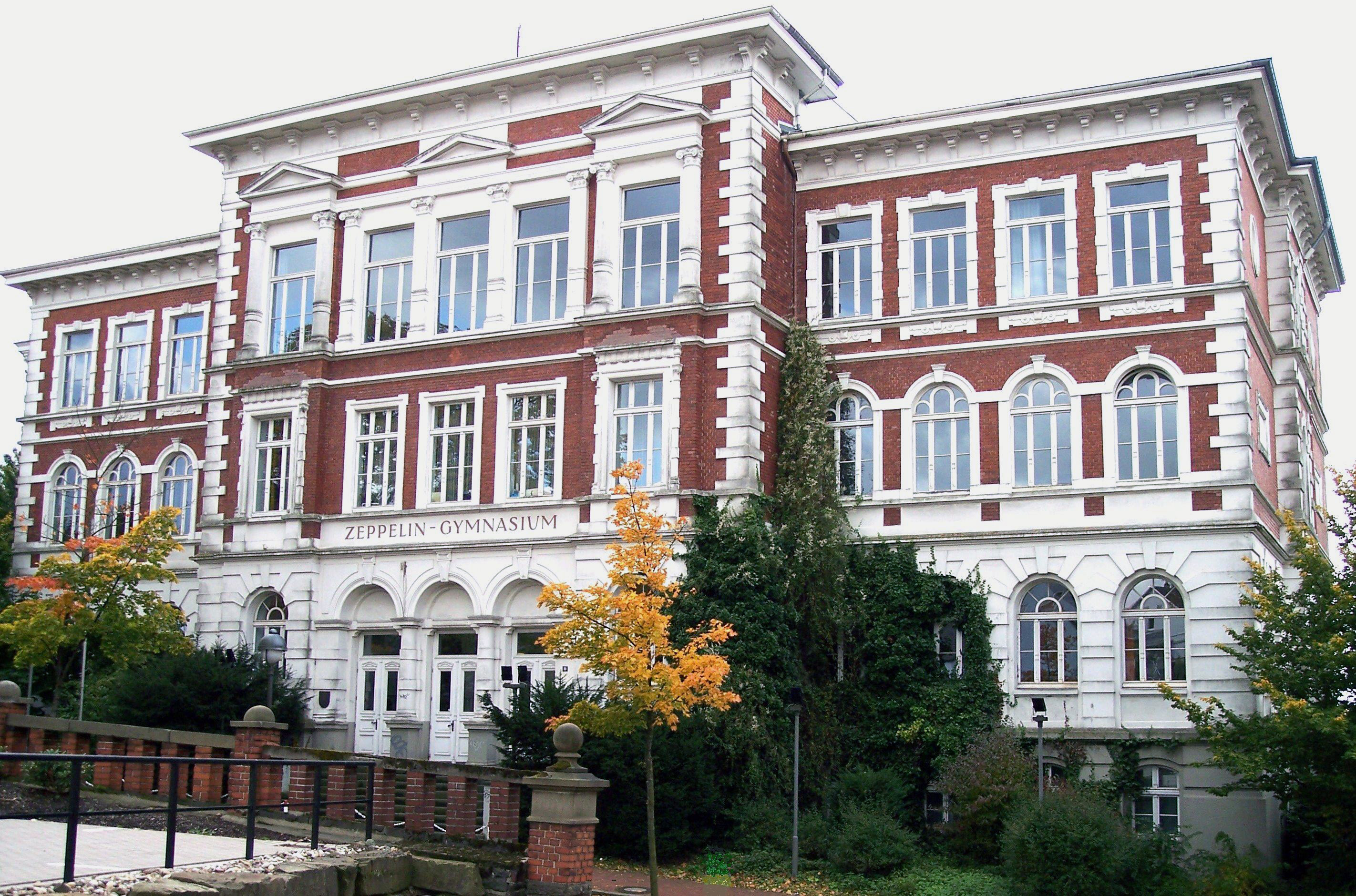 Hauptbau des Zeppelin-Gymnasiums an der Staberger Str. (1890 eingeweiht)